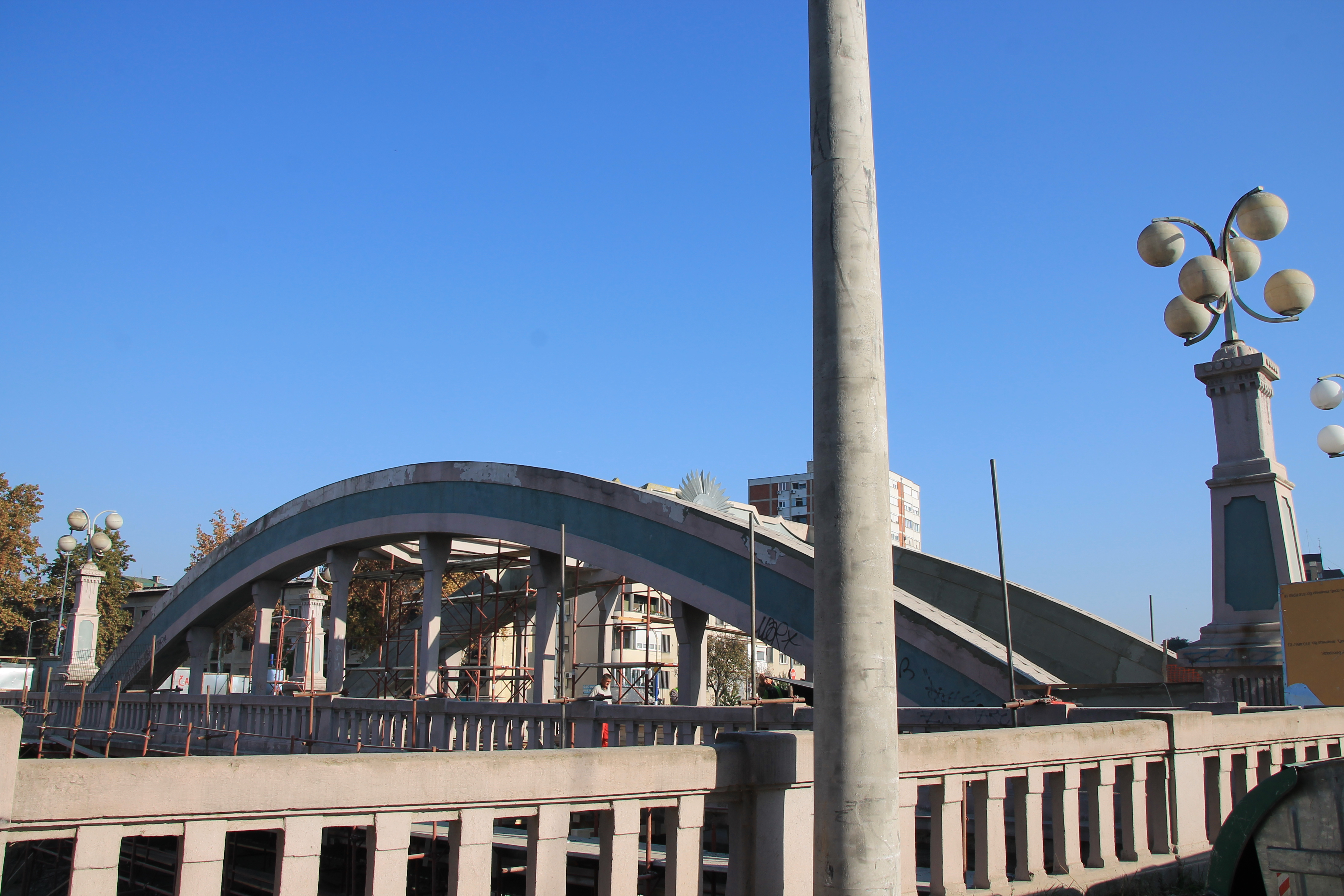 Lučni most br. 2